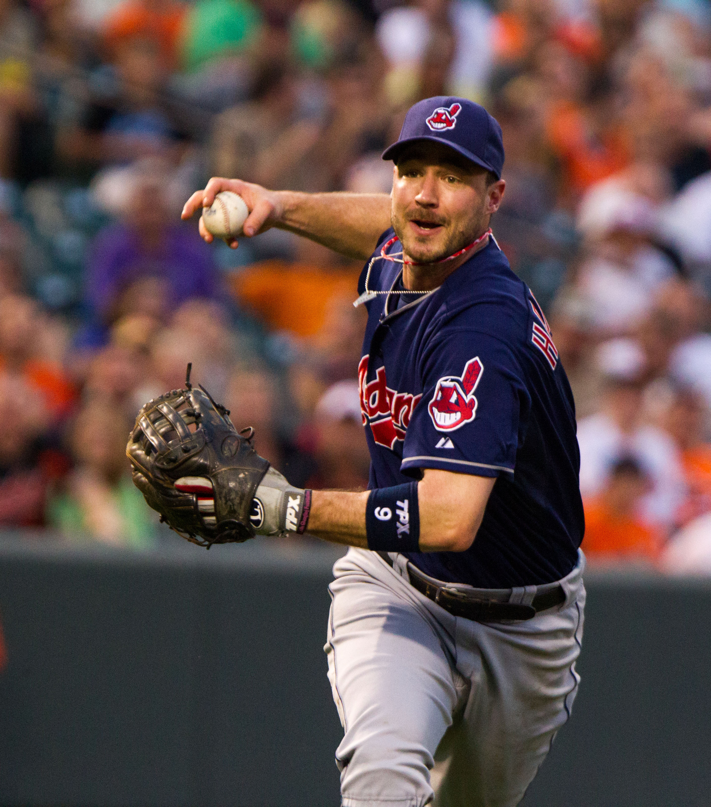 Jack Hannahan